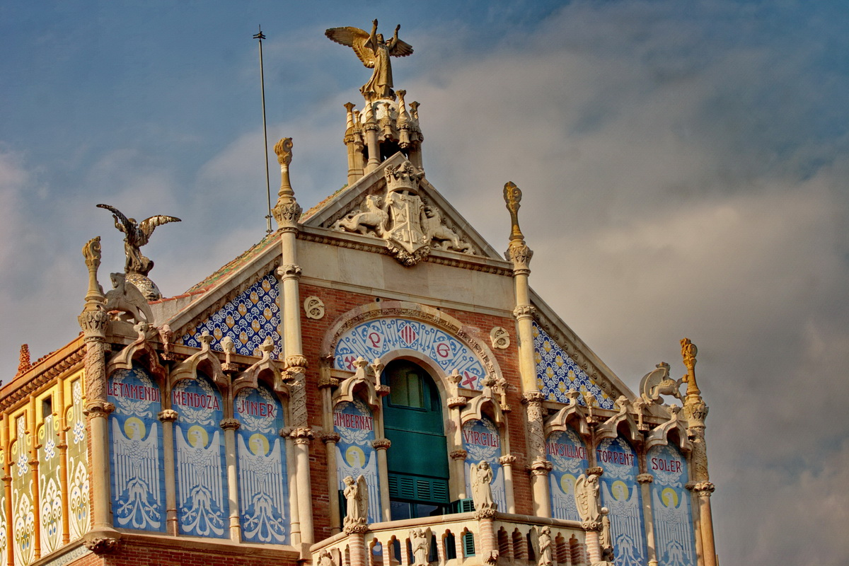 Pavelló d'Operacions (detall) de l'Hospital de Sant Pau (Barcelona, Catalunya) (1902-1911)